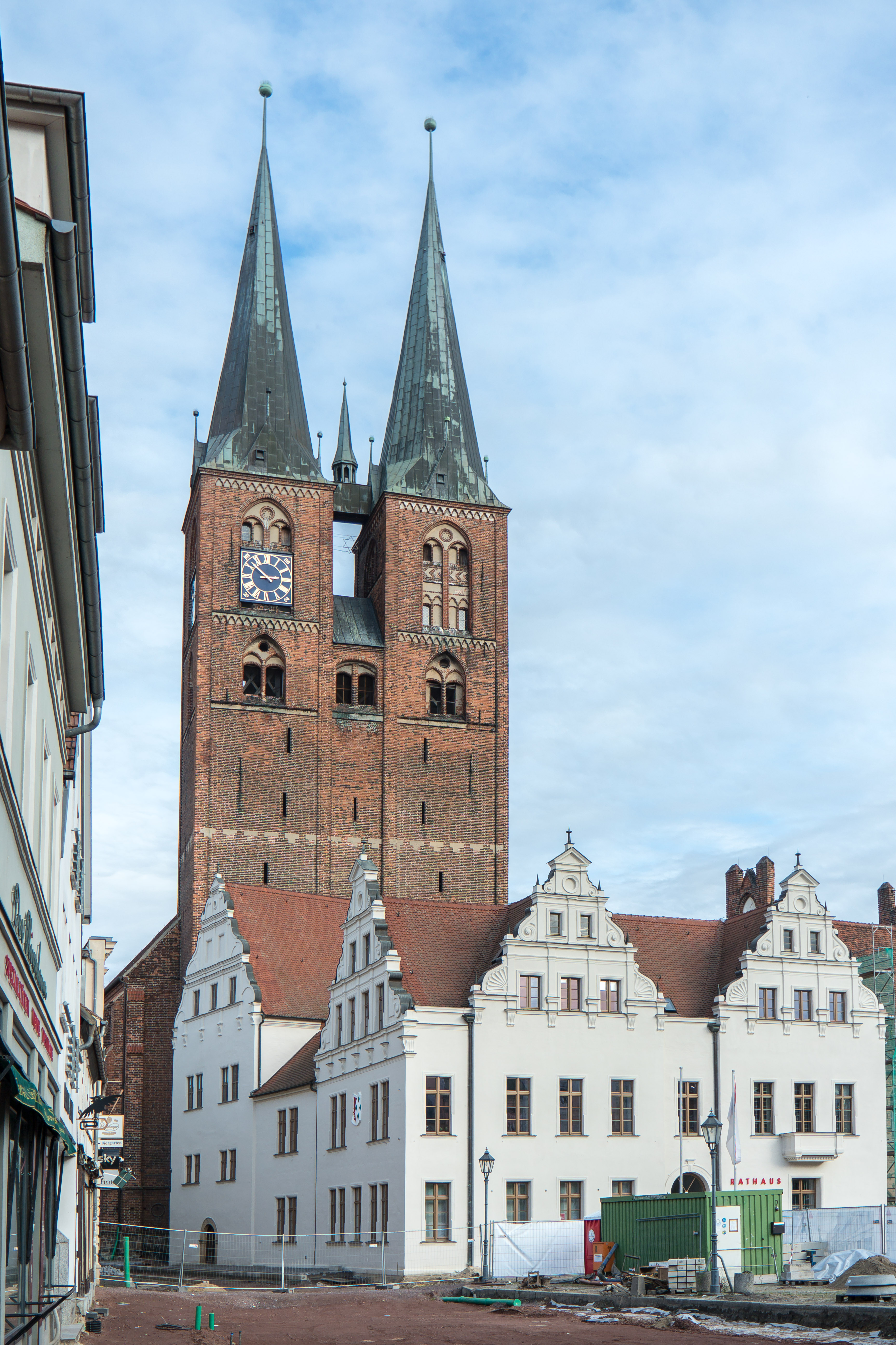 Rathaus und Marienkirche in Stendal